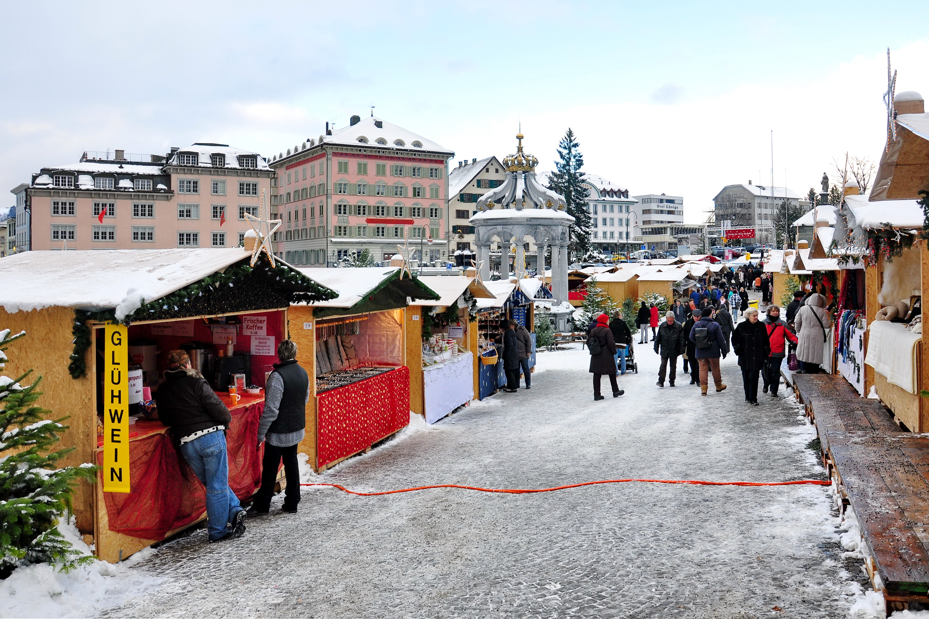 Weihnachtsmarkt, Hauptplatz in Einsiedeln (Switzerland)